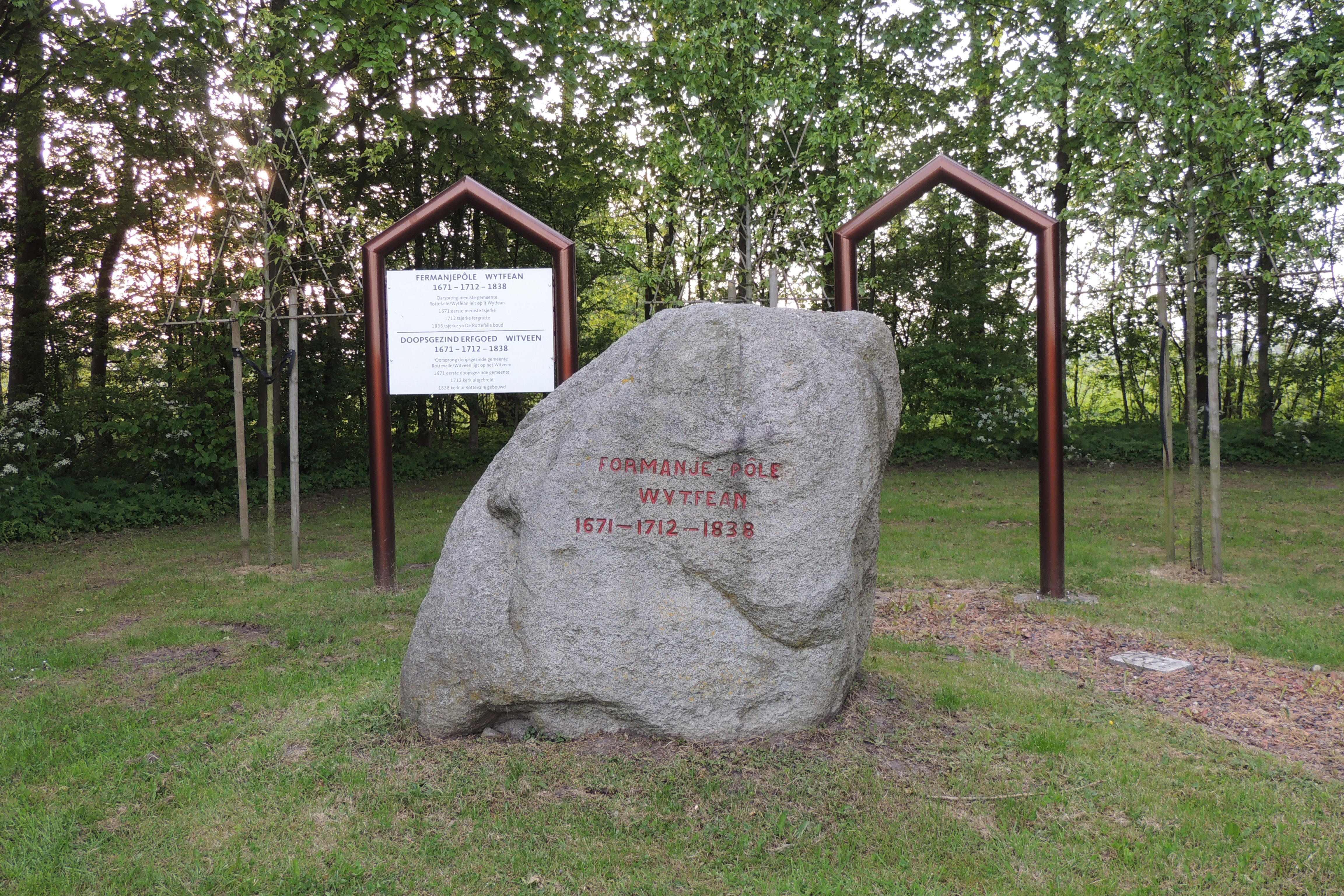 Doopsgezind efgoed Witveen nabij Rottevalle